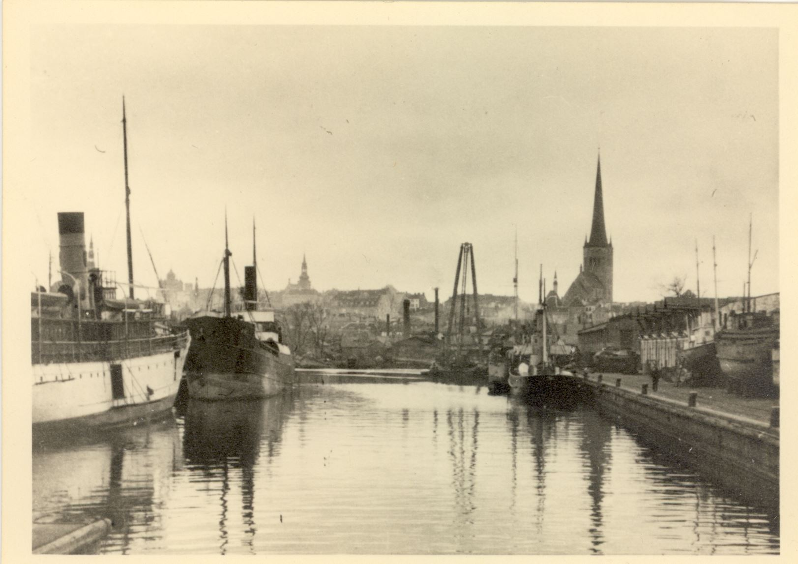 Tallinna sadam